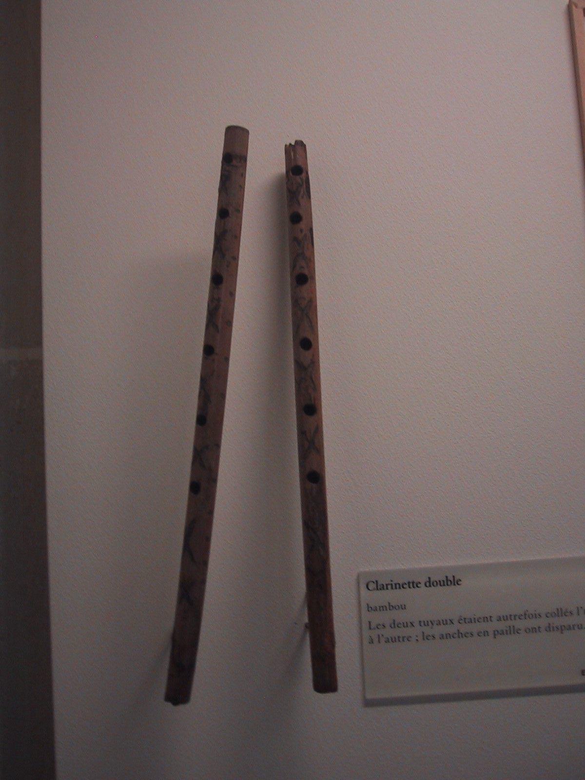 Clarinette double, bambou.